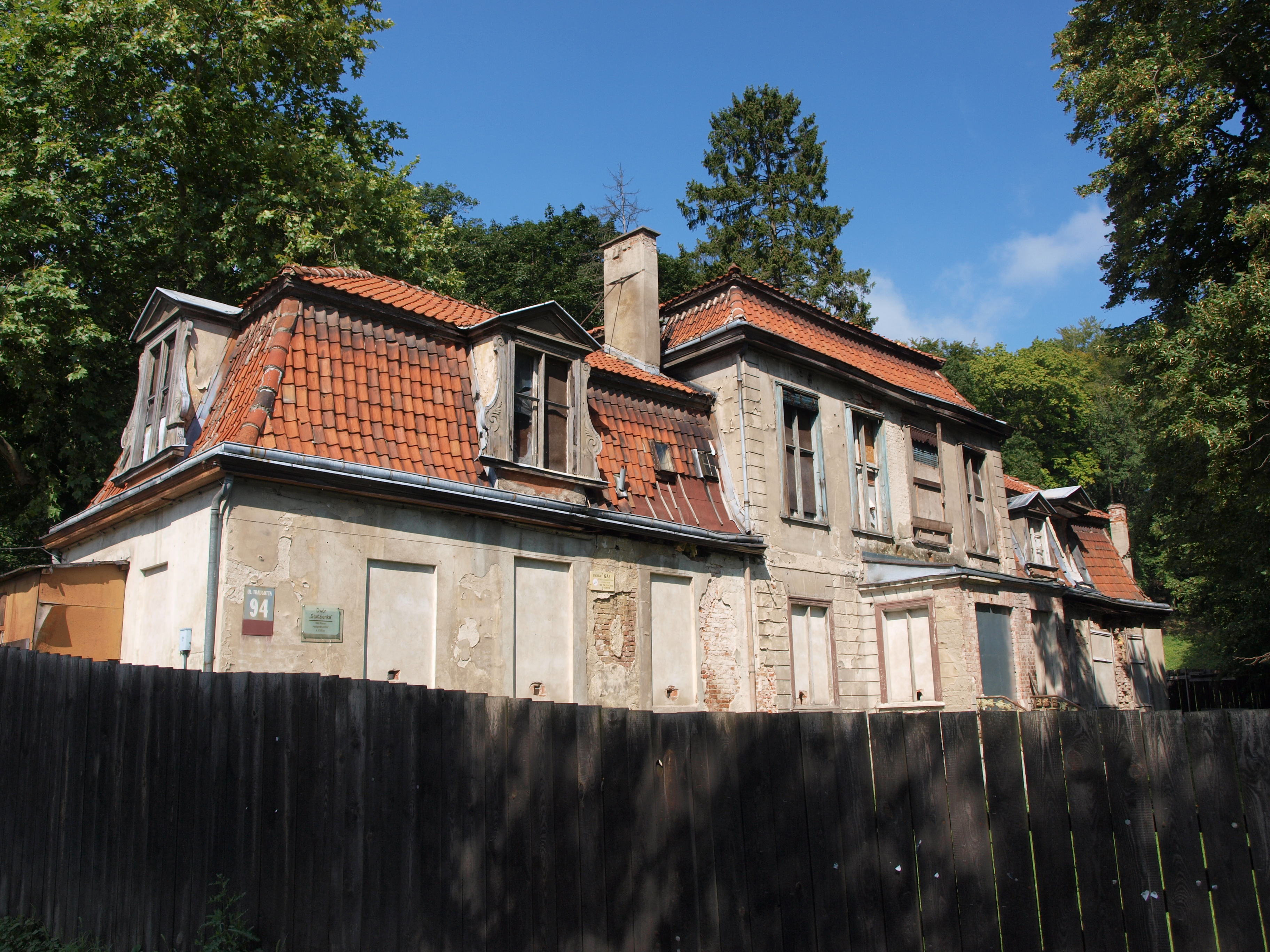 Zespół dworsko-parkowy, tzw. Studzienka (dwór, stajnia, budynek gospodarczy, założenie ogrodowe z grotą, ławką i kolumną) ul. Traugutta 94-96, Gdańsk.